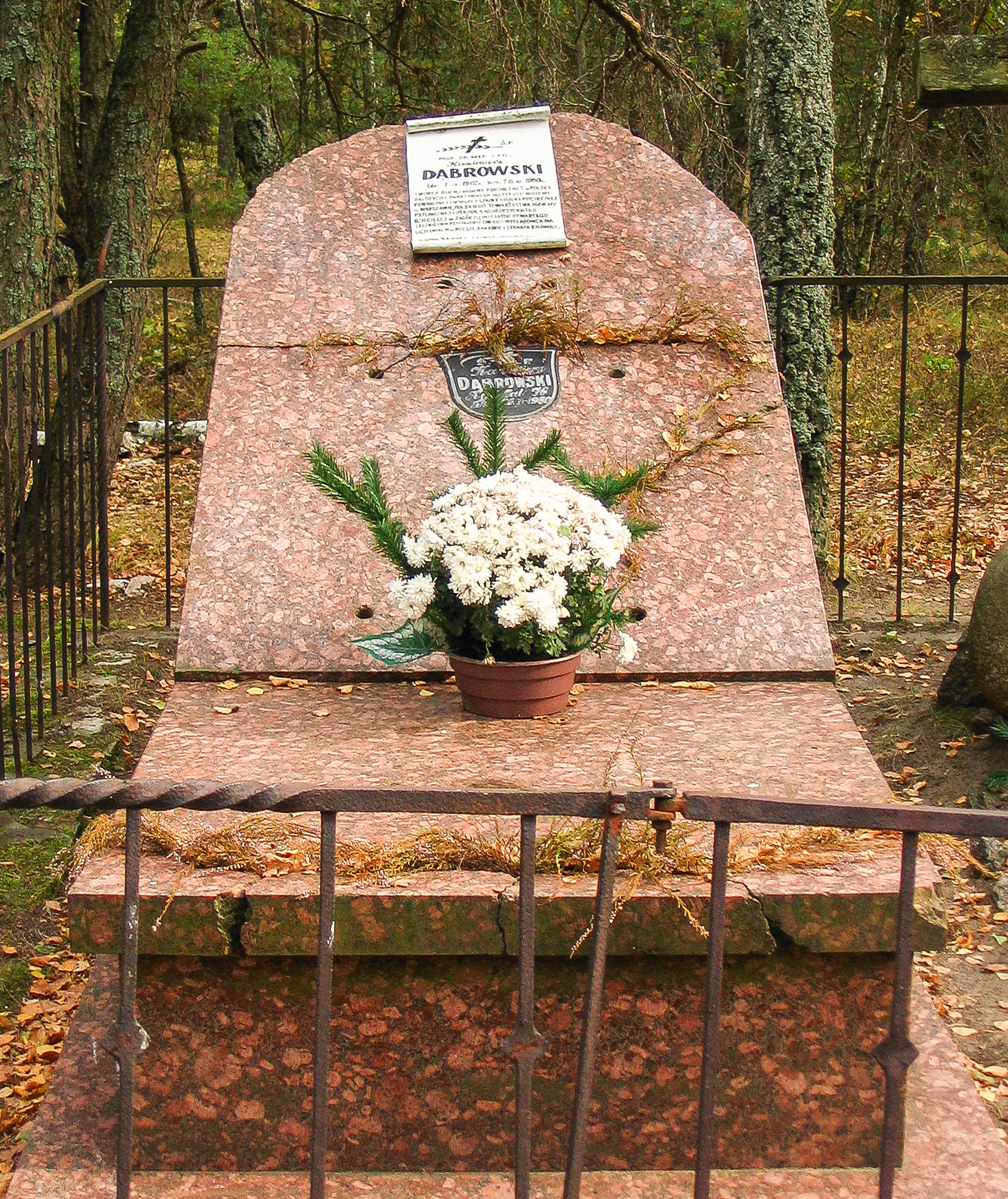 Grób Kazimierza Dąbrowskiego w Zagórzu koło Warszawy